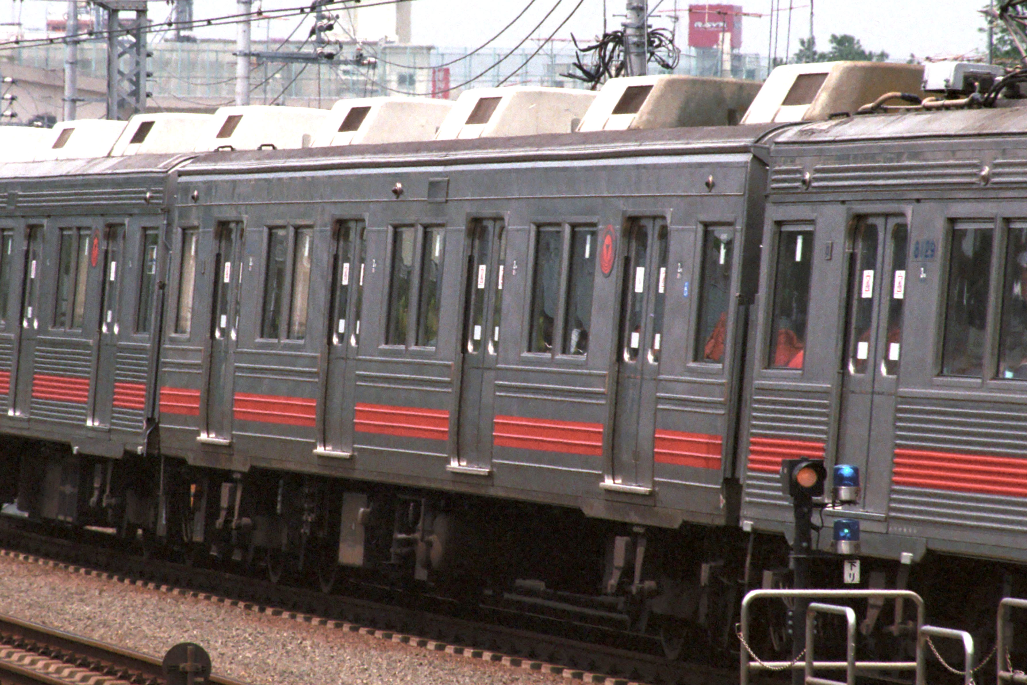 東急8000系 軽量ステンレス車体試作車（デハ8255号）